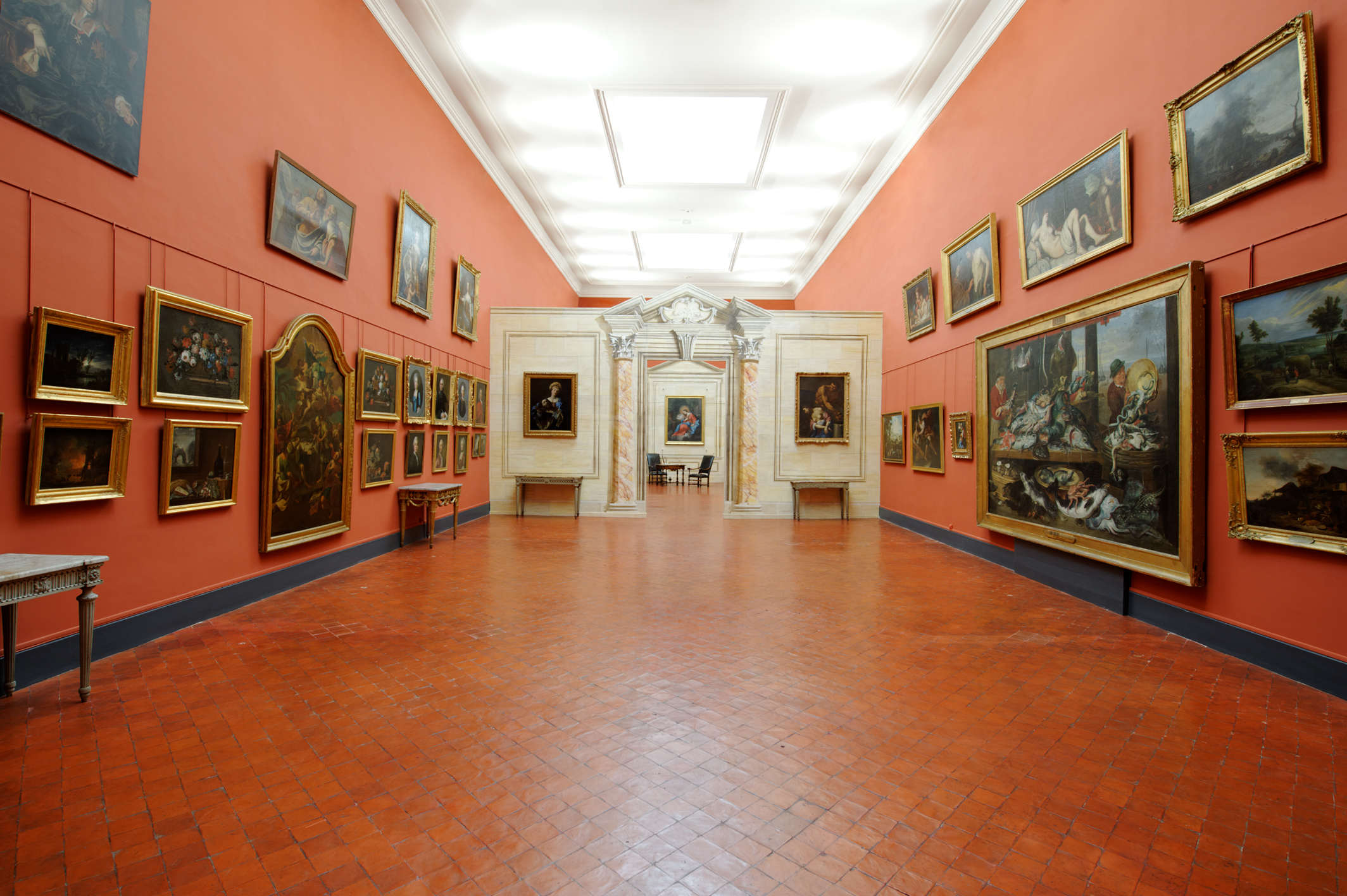 Musées des beaux-arts, trompe-l'oeil, musée Duplessis-Comtadin